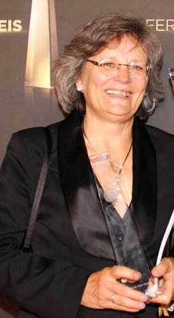 Preisträgerinnen Ursula Höf und Anneke Troost beim Deutschen Fernsehpreis 2012